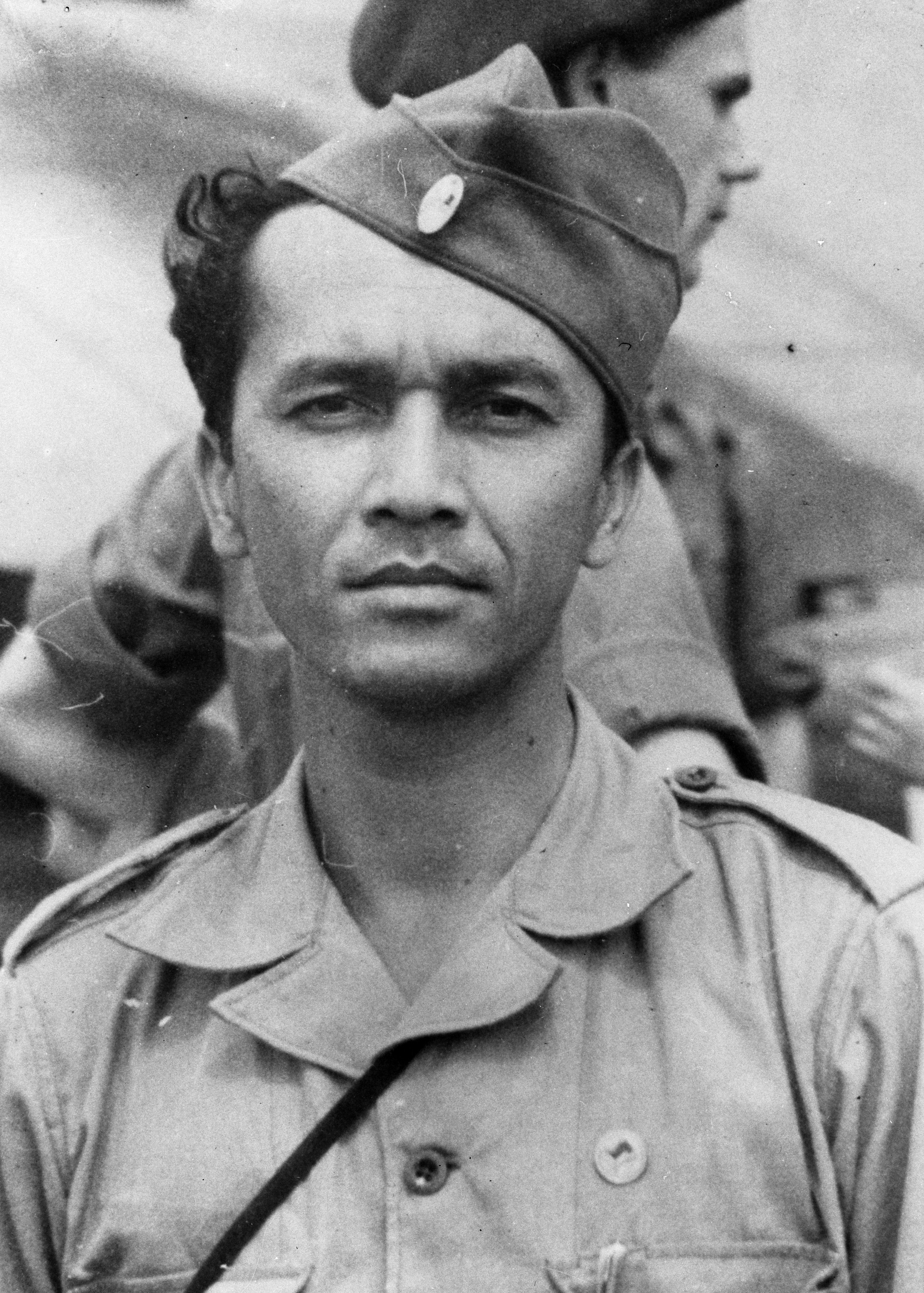 A.K. Gani, minister van Welvaart (Kemakmuran) in het kabinet Sjahrir III